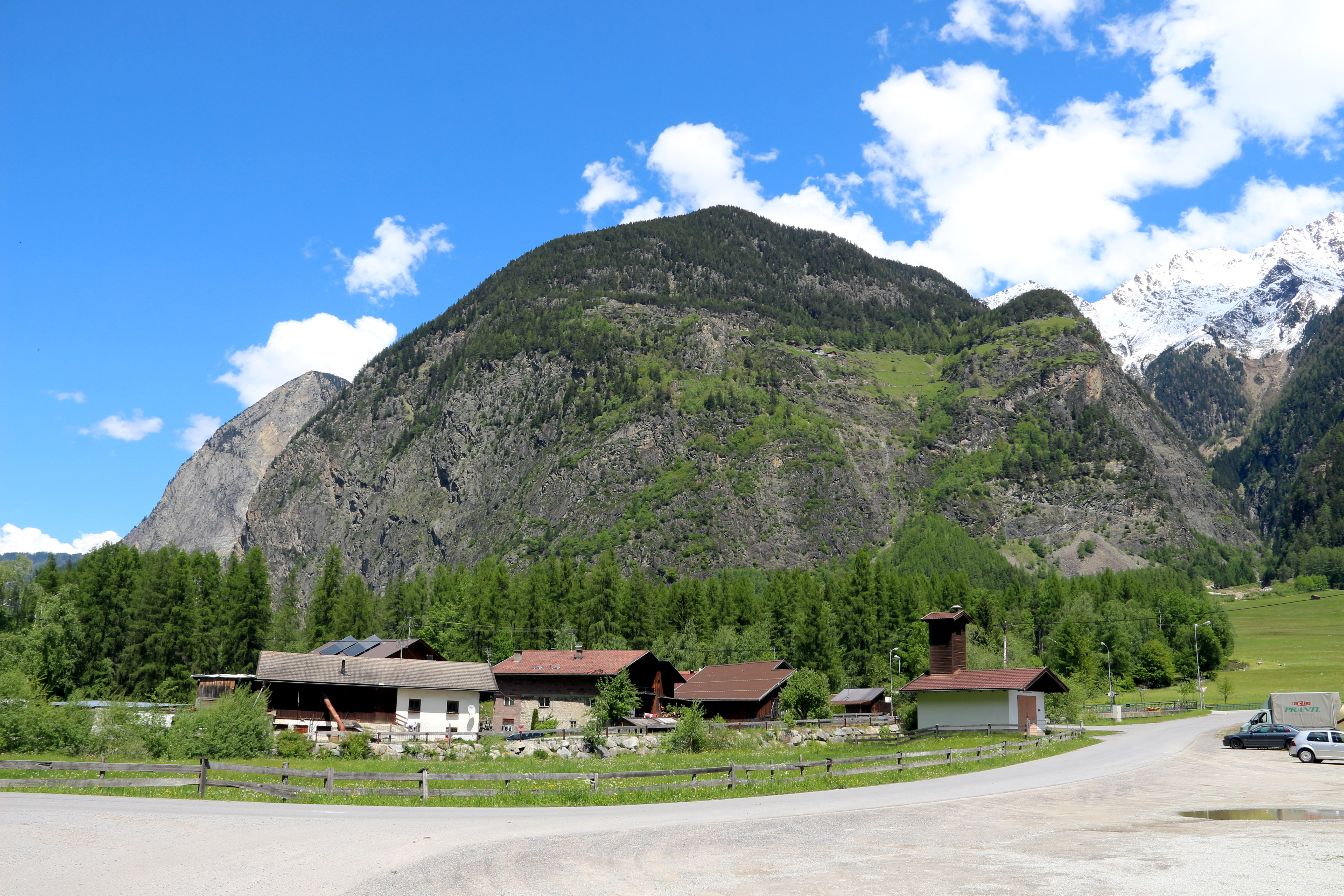 Engelswand, von Östen aus gesehen (Südwesten) This media shows the nature reserve in the Tyrol with the ID 7117.